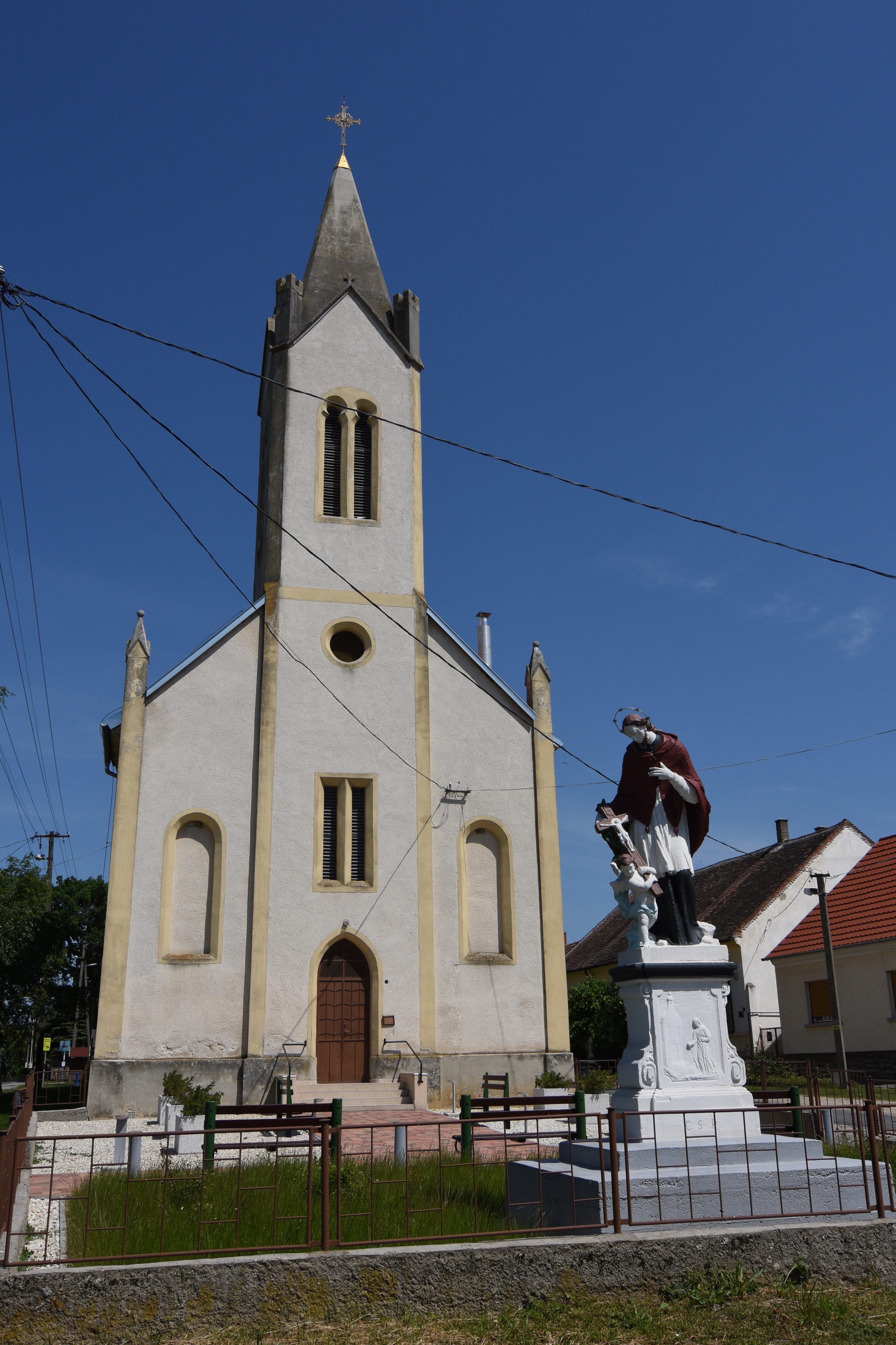 Ölbő templom